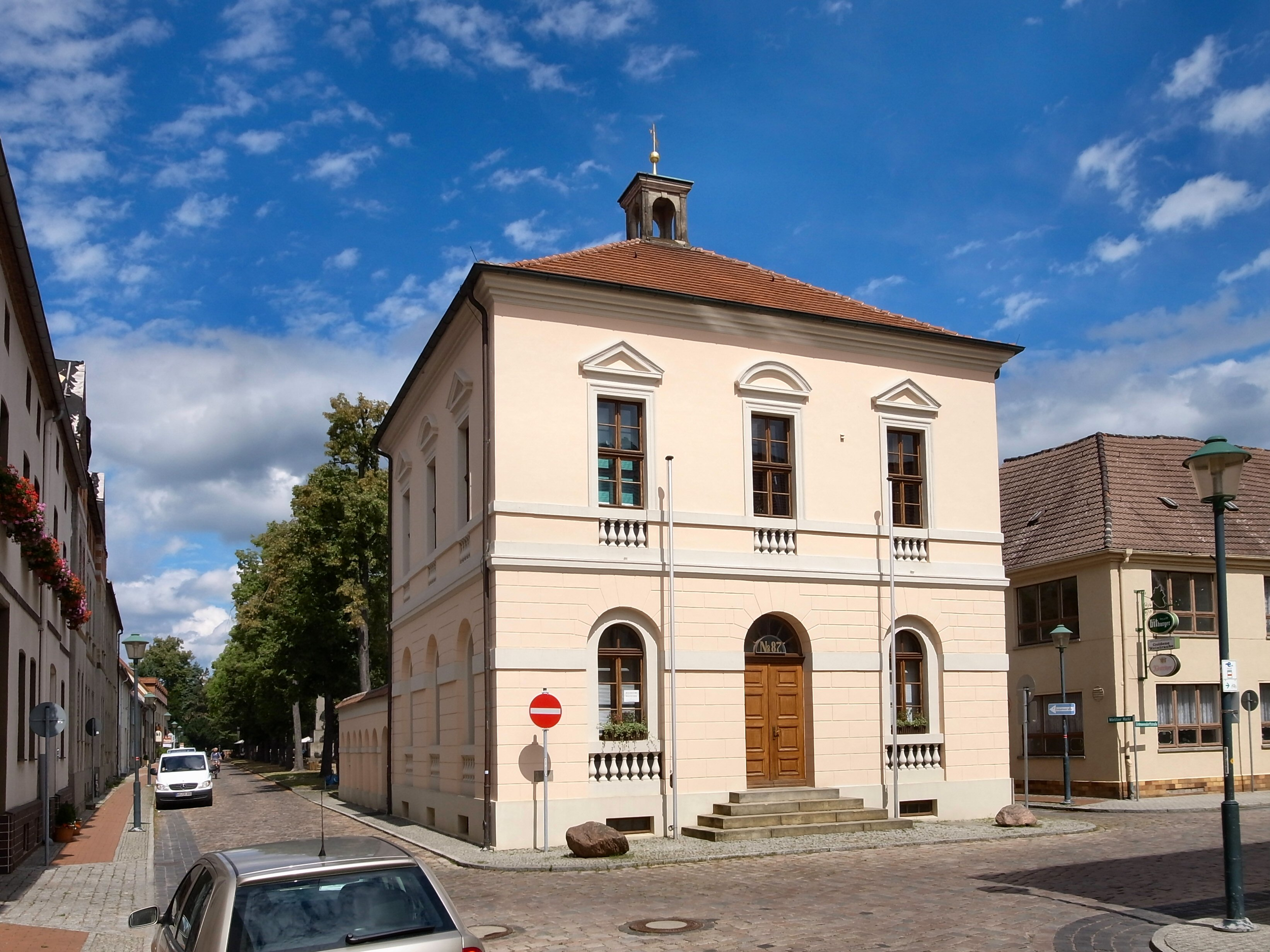 Das Wörlitzer Rathaus, 1792-95 von Friedrich Wilhelm von Erdmannsdorff erbaut